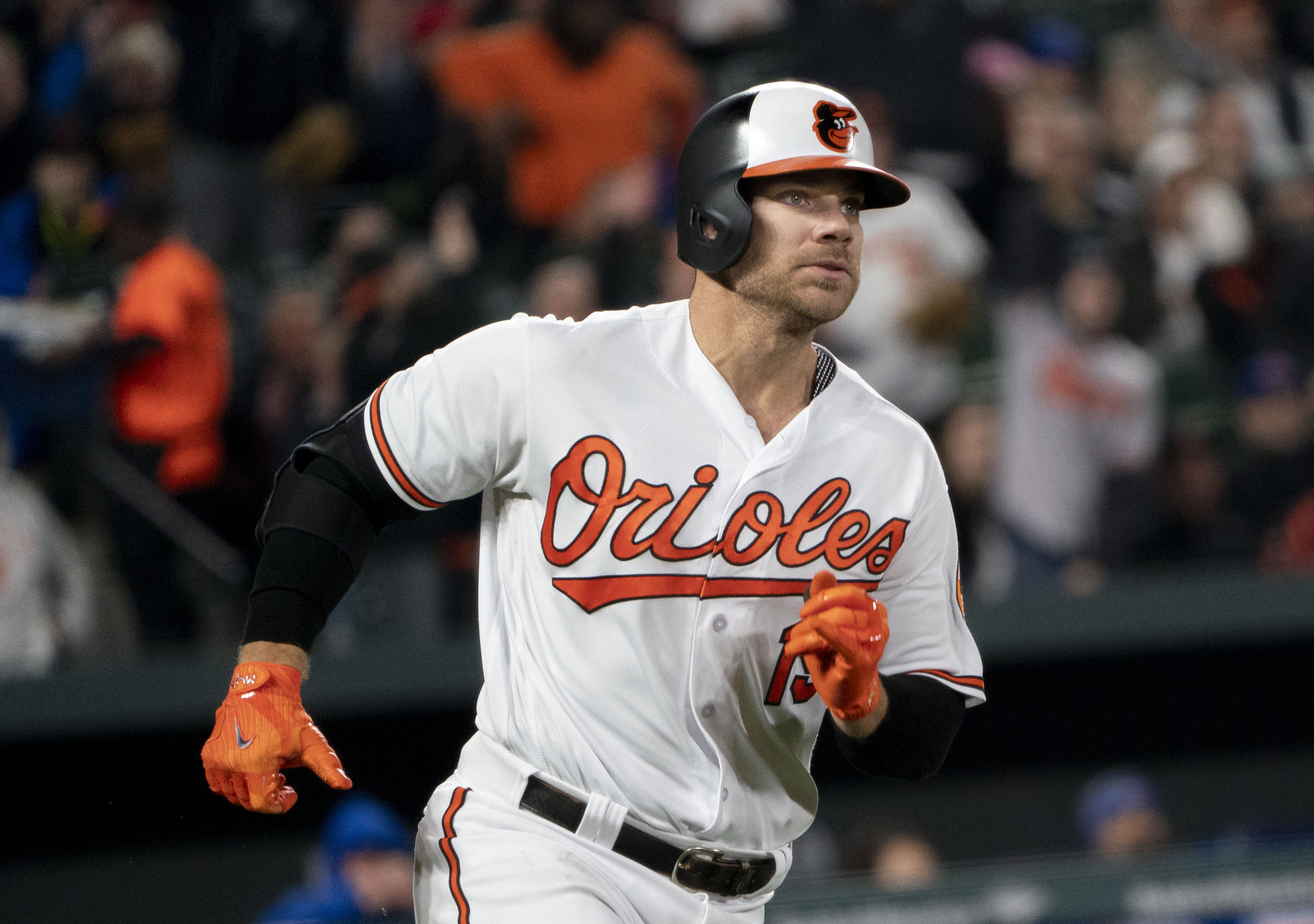 Blue Jays at Orioles 4/11/18